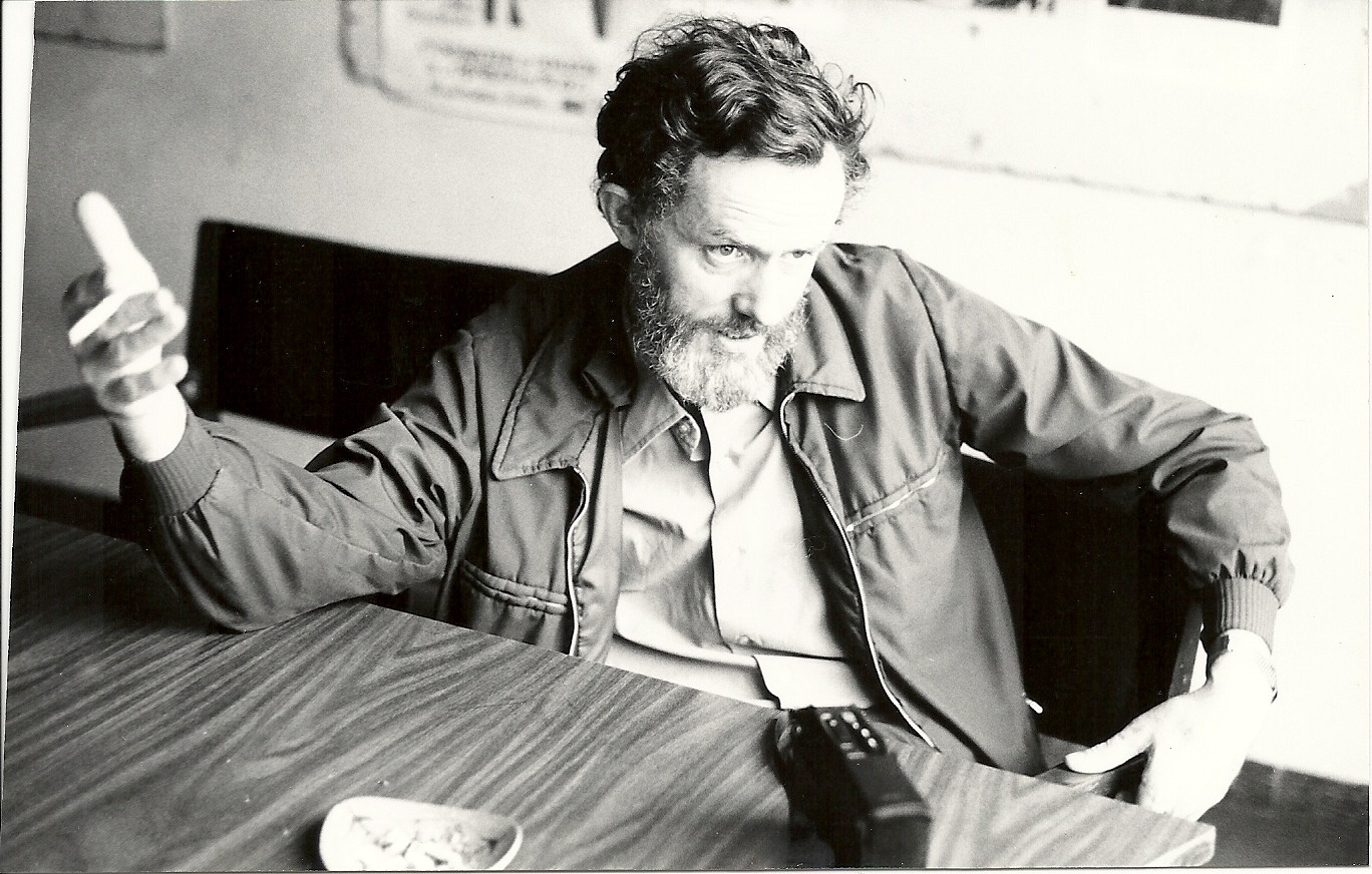 reportaje en méxico df